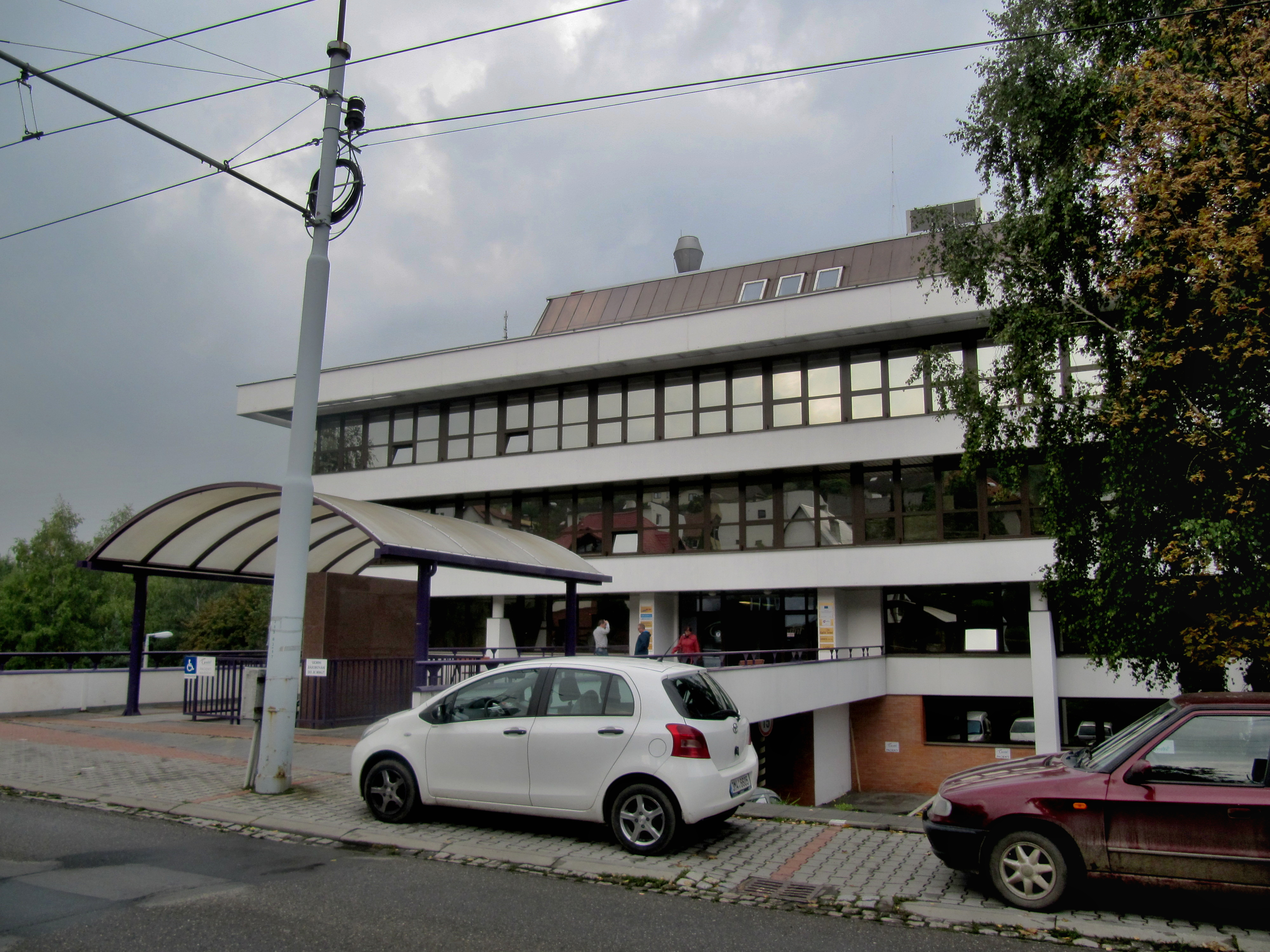 Zlín, část Příluky, GEMINI-SOUKROMÁ OČNÍ KLINIKA